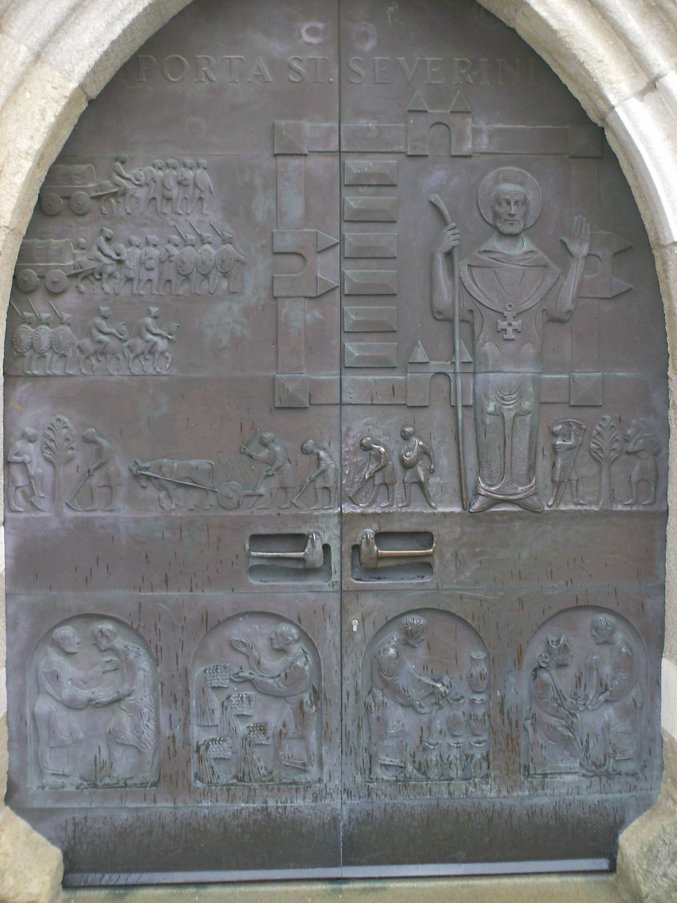 Kirchenpforte St Laurenz mit Darstellungen aus der Severinslegende